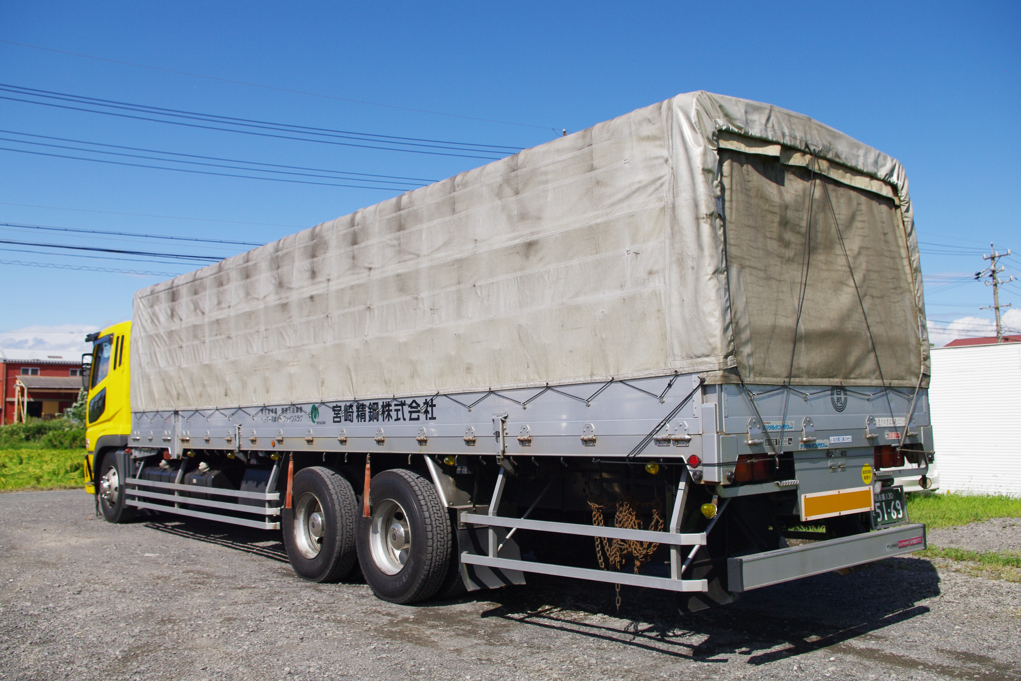 日邦通運所有の幌トラック